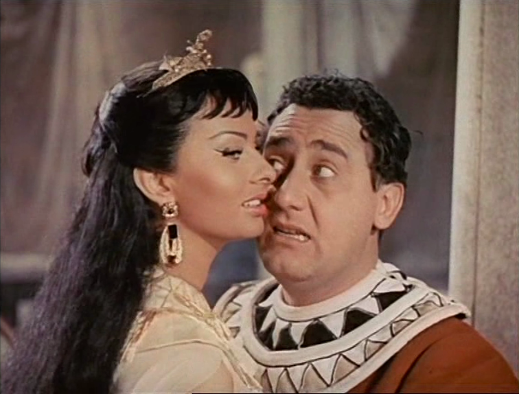 Scena del film